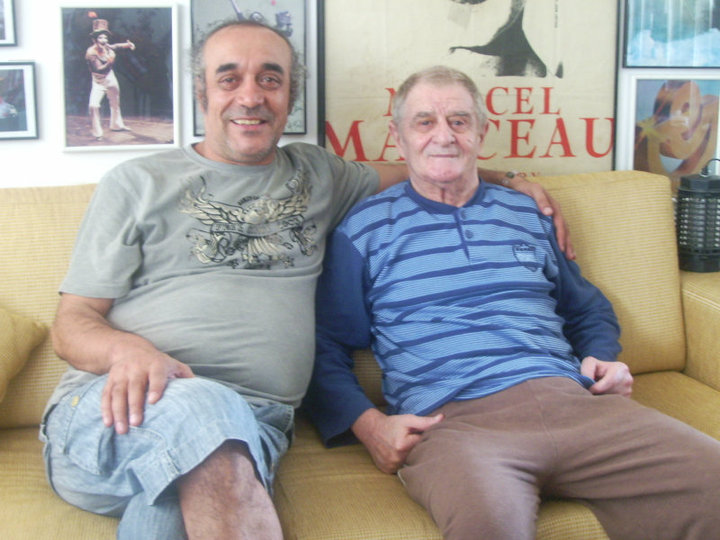 Erdinç Dinçer'le Kuşadası'nda çekildi.